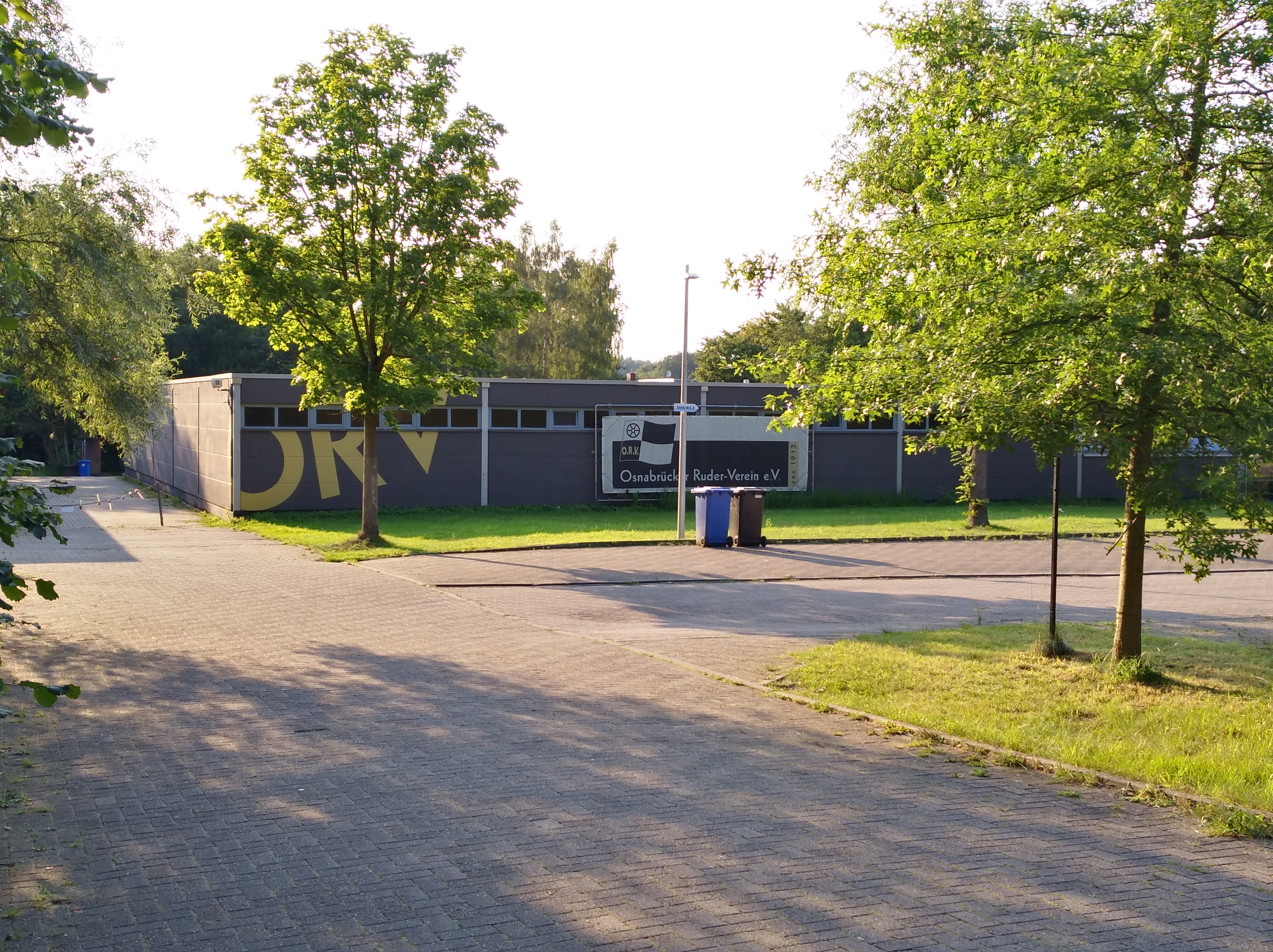 Vereinsheim und Bootshaus des Osnabrücker Ruder-Vereins e.V. (ORV) als Teil des Wassersportzentrums am Stichkanal Osnabrück, fotografiert von der "Glückaufstraße" aus.